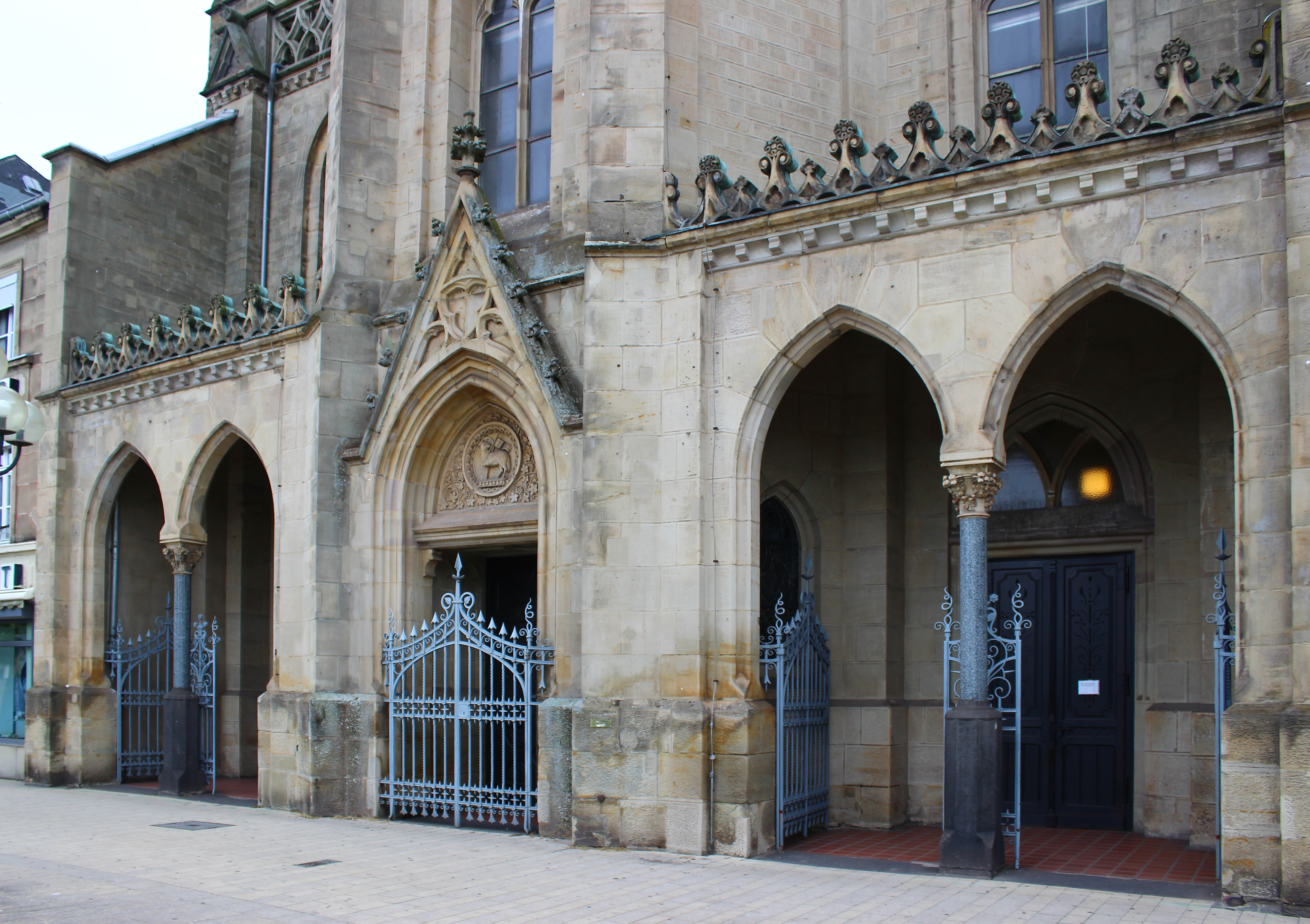 Portale der katholischen Pfarrkirche St. Ludwig in Saarlouis, Saarland